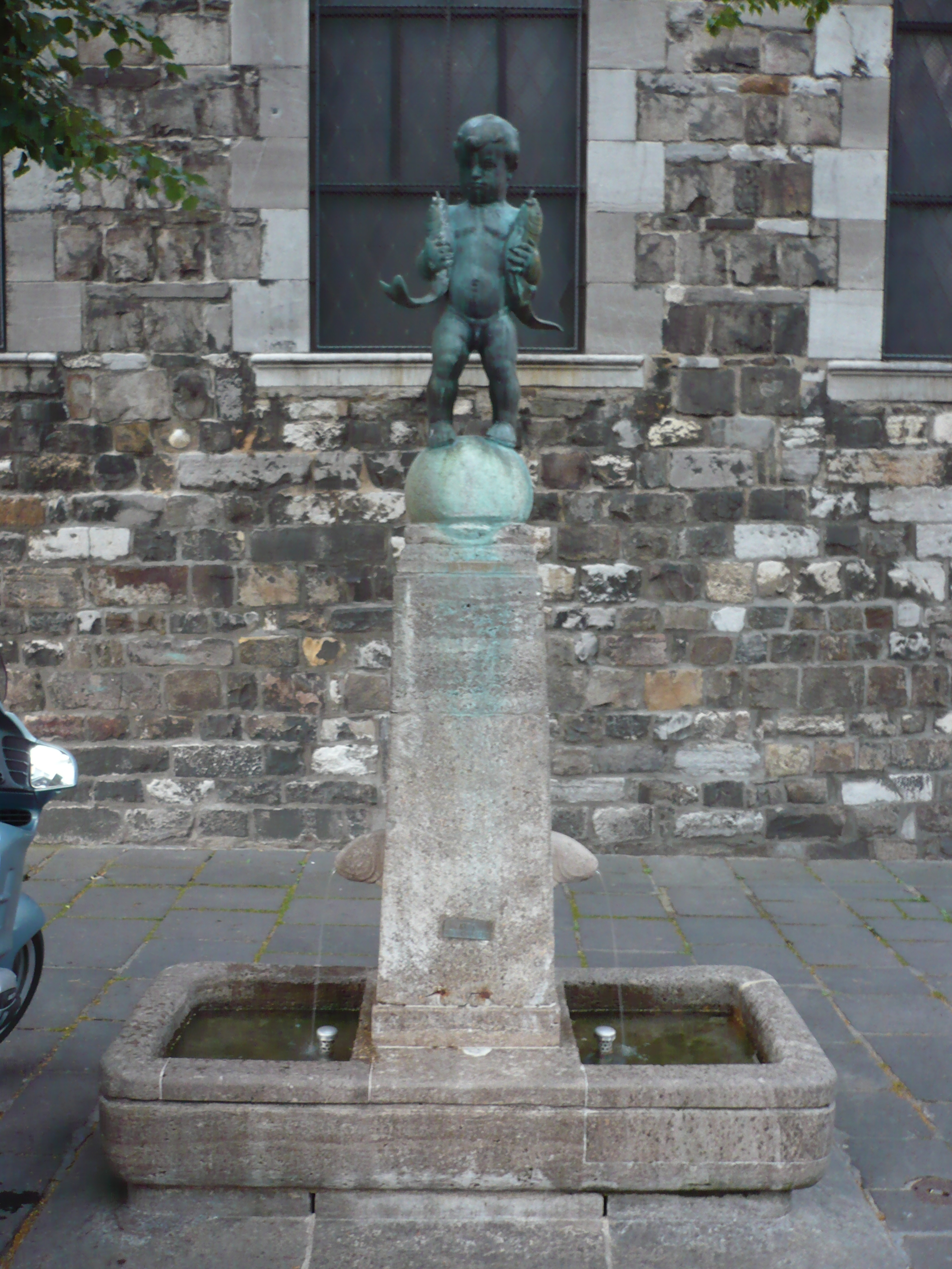 Fischpüddelchen, Brunnen in Aachen